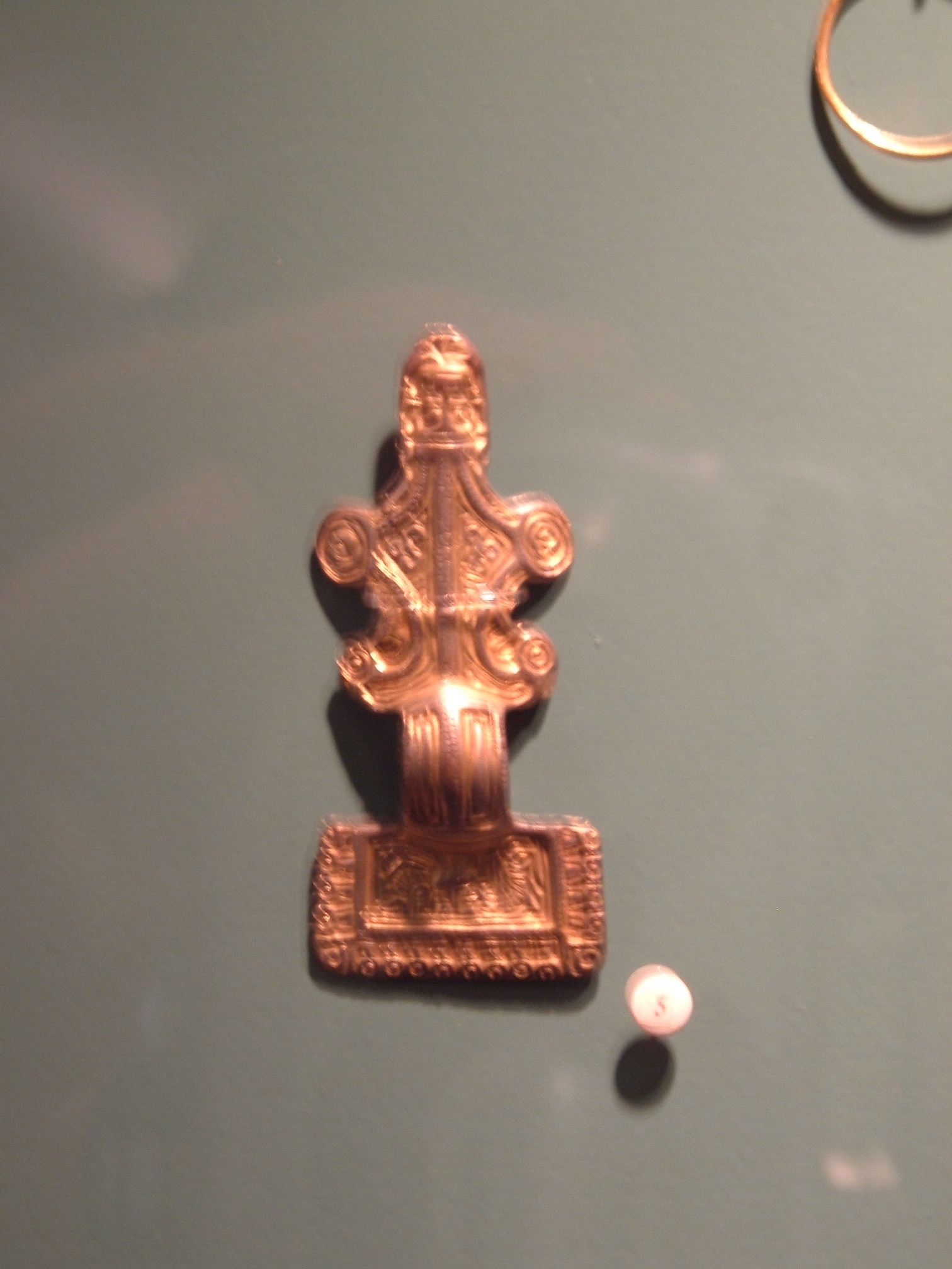 Gepida aranycsat Szandaszőlősről. A Damjanich János Múzum gyűjteményéből.